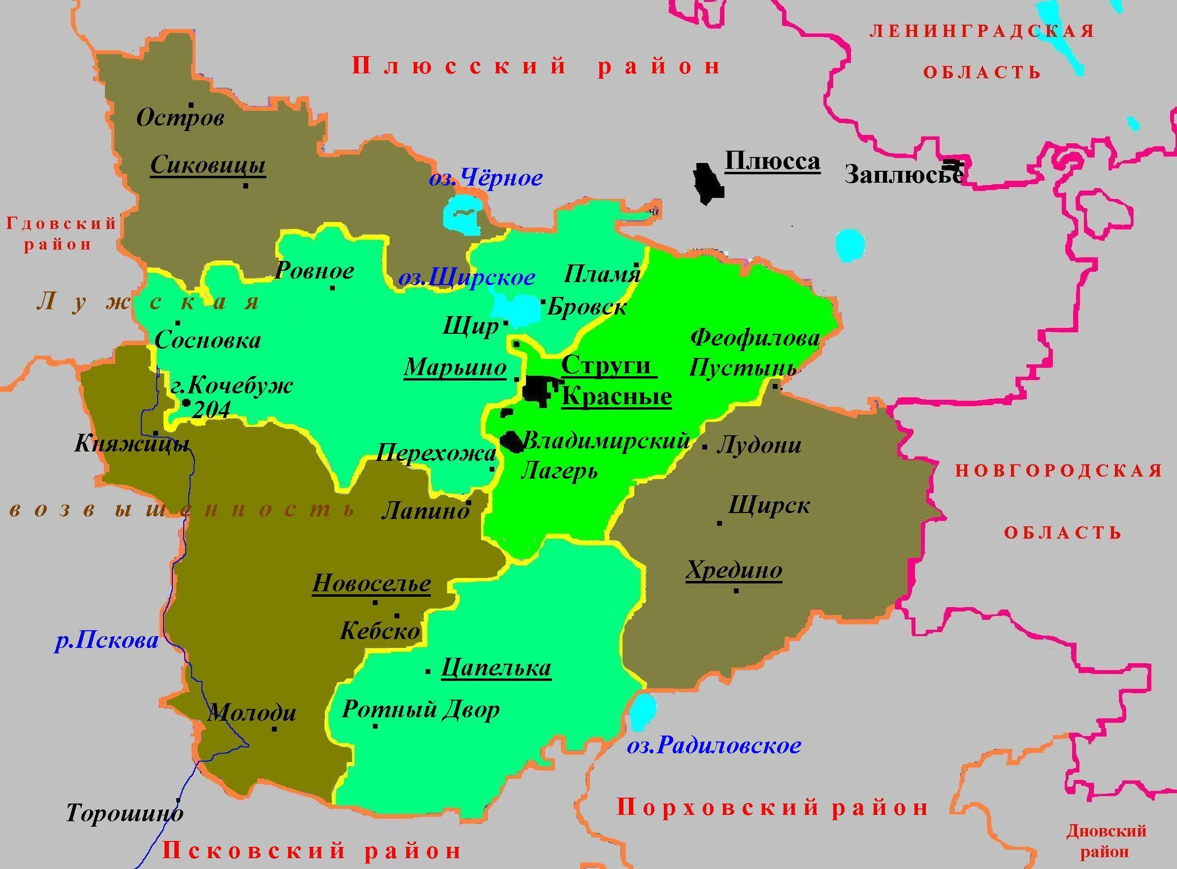 Административное деление Стругокрасненского района